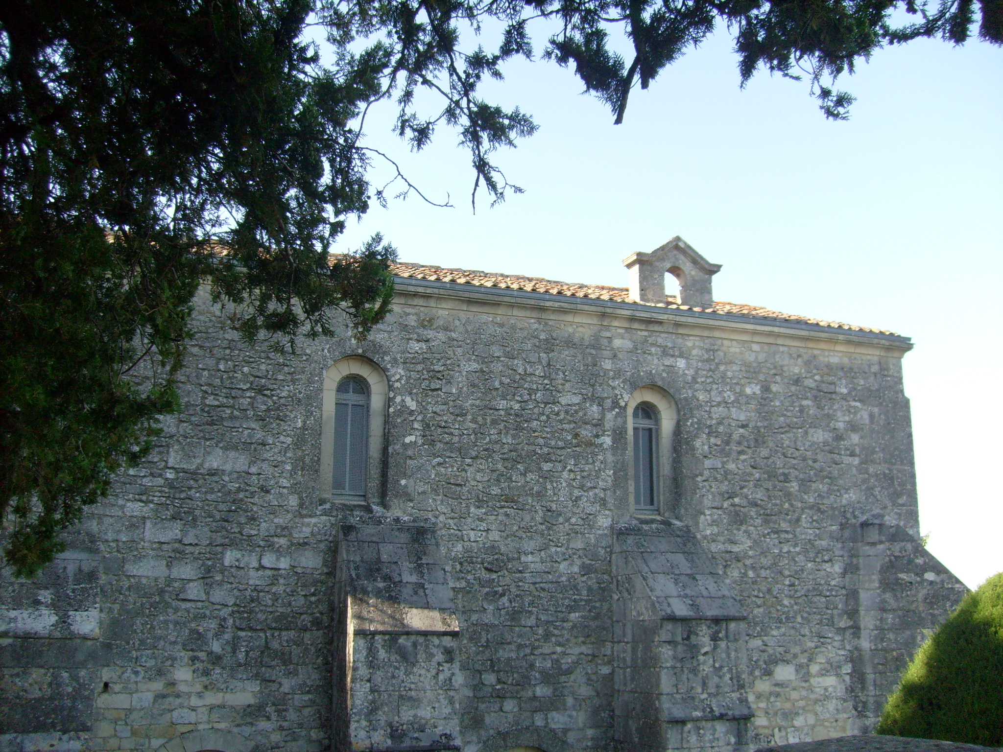 La chapelle Saint-Gilles à Pons (actuel musée archéologique)